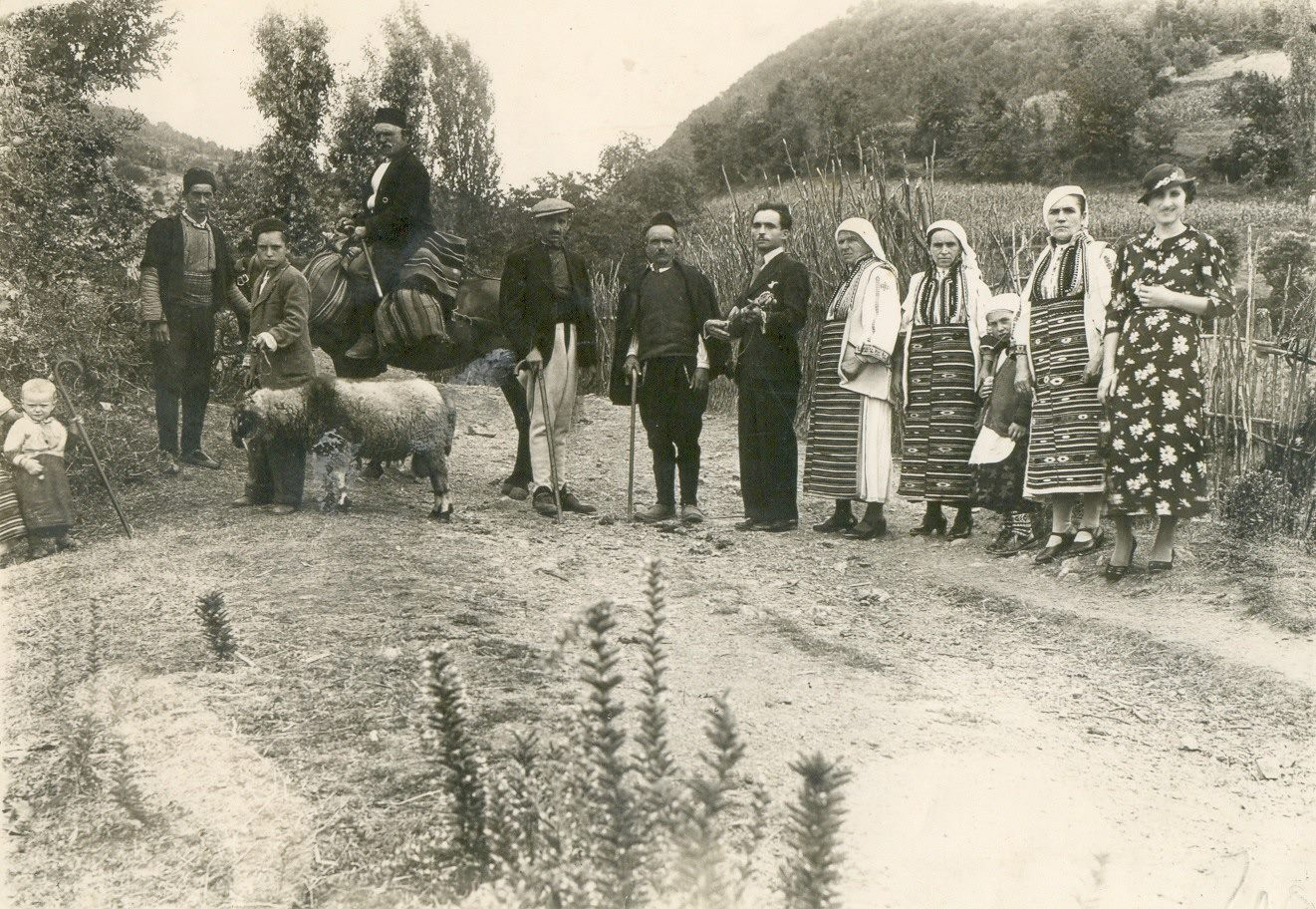 Буринец околу 1938 г. На коњ е Фидан Чадиноски, до него со бели бечви е Крсте Пепоски. Првата жена од лево е Каља Чадиноска жена на Крсте Пепоски, до неа е Тодора, мажена за Крсте Зрмановски и сестра на Крсте Пепоски. Претпоследна е жената на Фидан „Фиданица“.